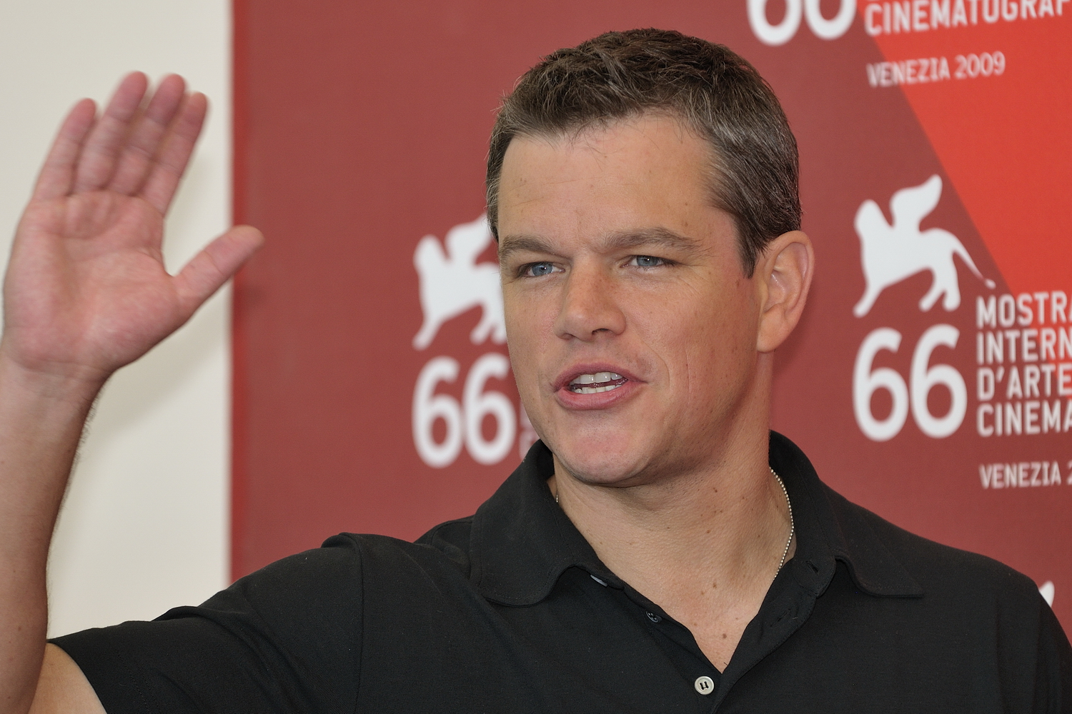 66ème Festival du Cinéma de Venise (Mostra), 6ème jour (07/09/2009) Photocall avec Matt Damon et Steven Soderbergh pour le film : The Informant